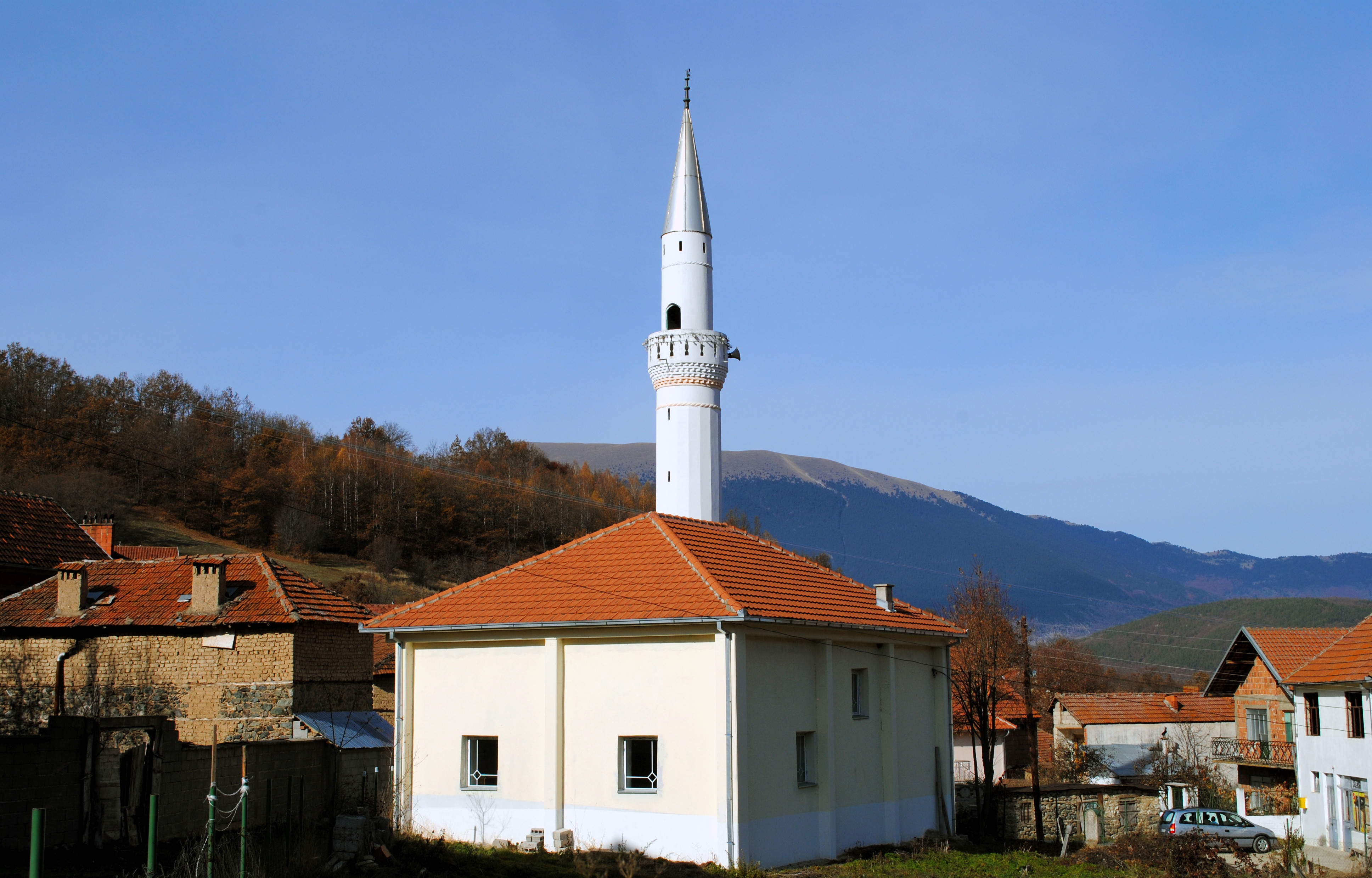 Seoska džamija